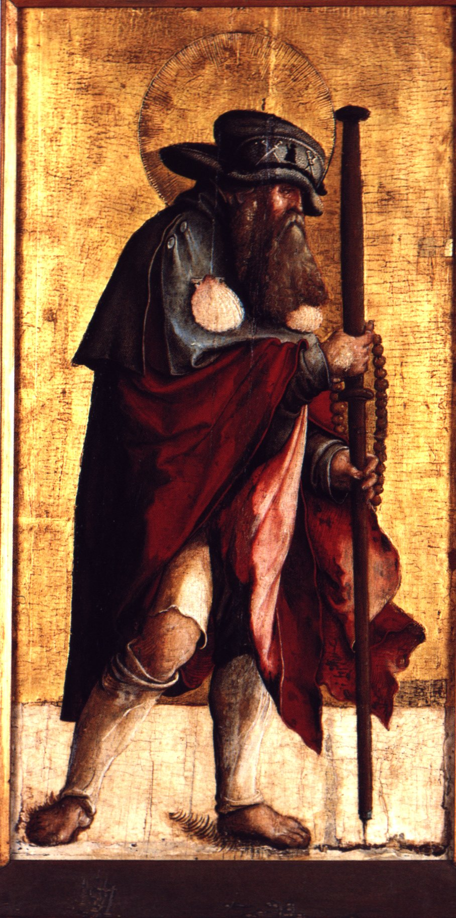 Ausstattung der ehemaligen Seitenaltäre der Meßkircher St. Martinskirche, Standflügel: Heiliger Jakobus Major als Pilger Eingescannt aus: Anna Moraht-Fromm und Hans Westhoff: Der Meister von Meßkirch – Forschungen zur südwestdeutschen Malerei des 16. Jahrhunderts, Ulm, 1997, S. 164